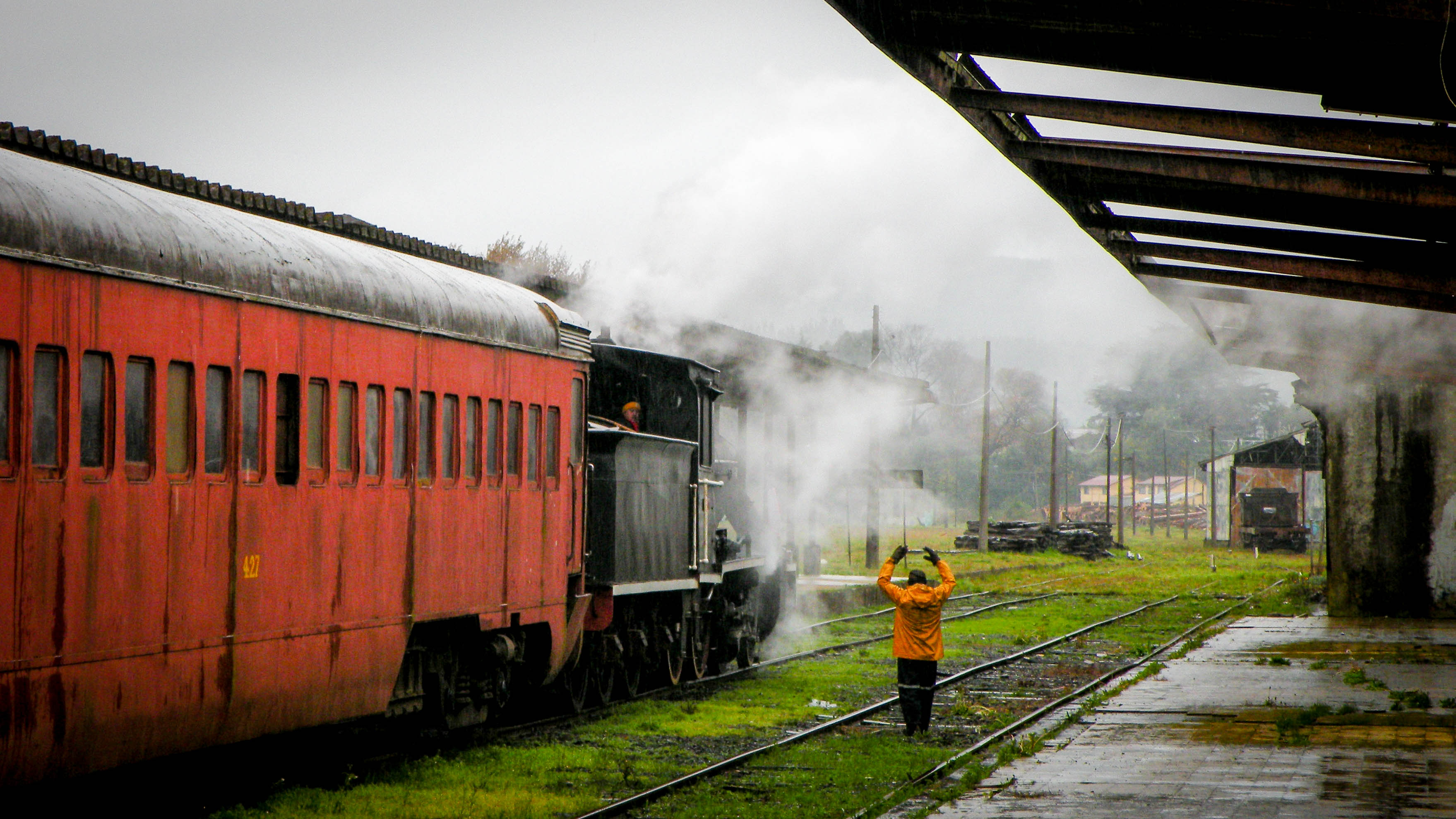 A veces, revisando archivos, nos encontramos con diversos momentos, e instantáneas que se van recopilando y que van quedando ahí en la memoria... De cuando el tren, salía de la verdadera estación de Valdivia, el momento en que la pequeña 620 acopla la composición para minutos mas tarde emprender viaje hacia Antilhue, en una feria, y lluviosa mañana frente al calle-calle. Las primeras fotos que tome con una cámara semipro...por ende el exceso de ruido por andar con el ISO por cualquier lado... Valdivia, 2011